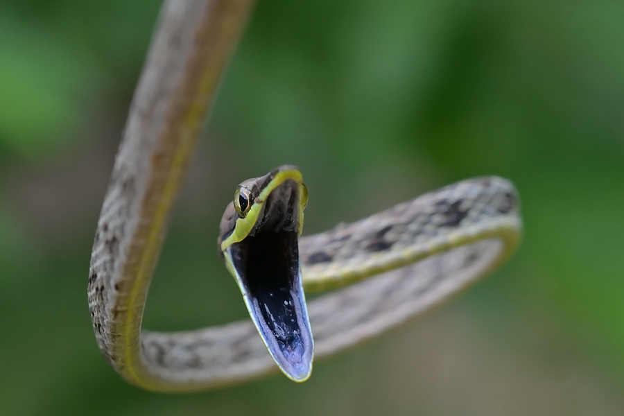 Colubridae: Oxybelis aeneus Isla Colón, Bocas del Toro, Panama